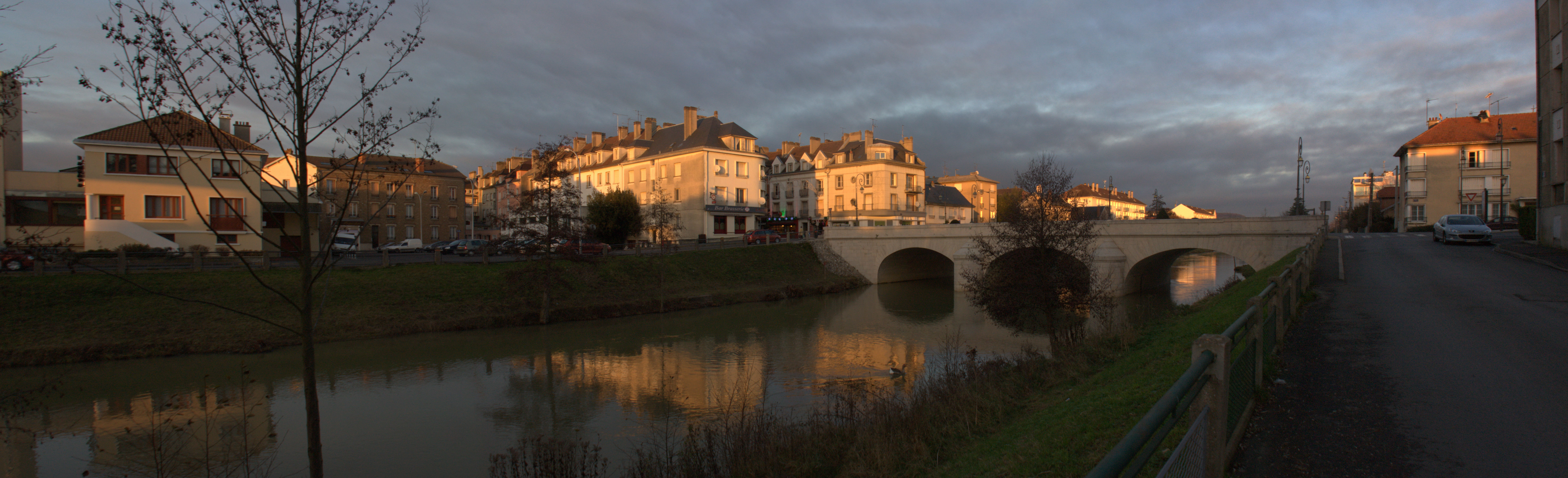 La Fausse Marne et le pont sur la Fausse Marne à Château-Thierry.